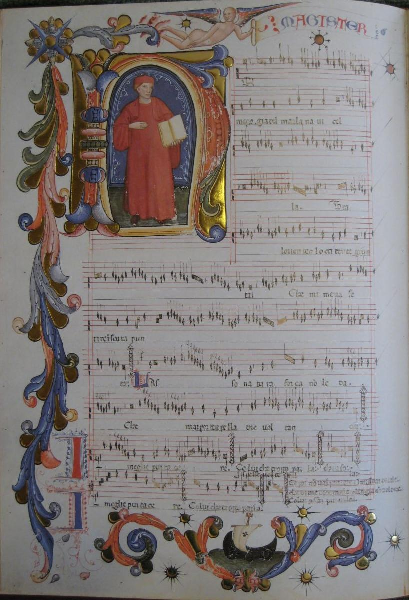 Nel meço già del mar la naviciela, Codex Squarcialupi